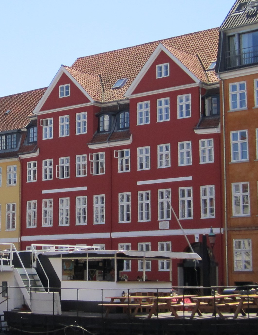 Nyhavn 20 in Copenhagen, Denmark